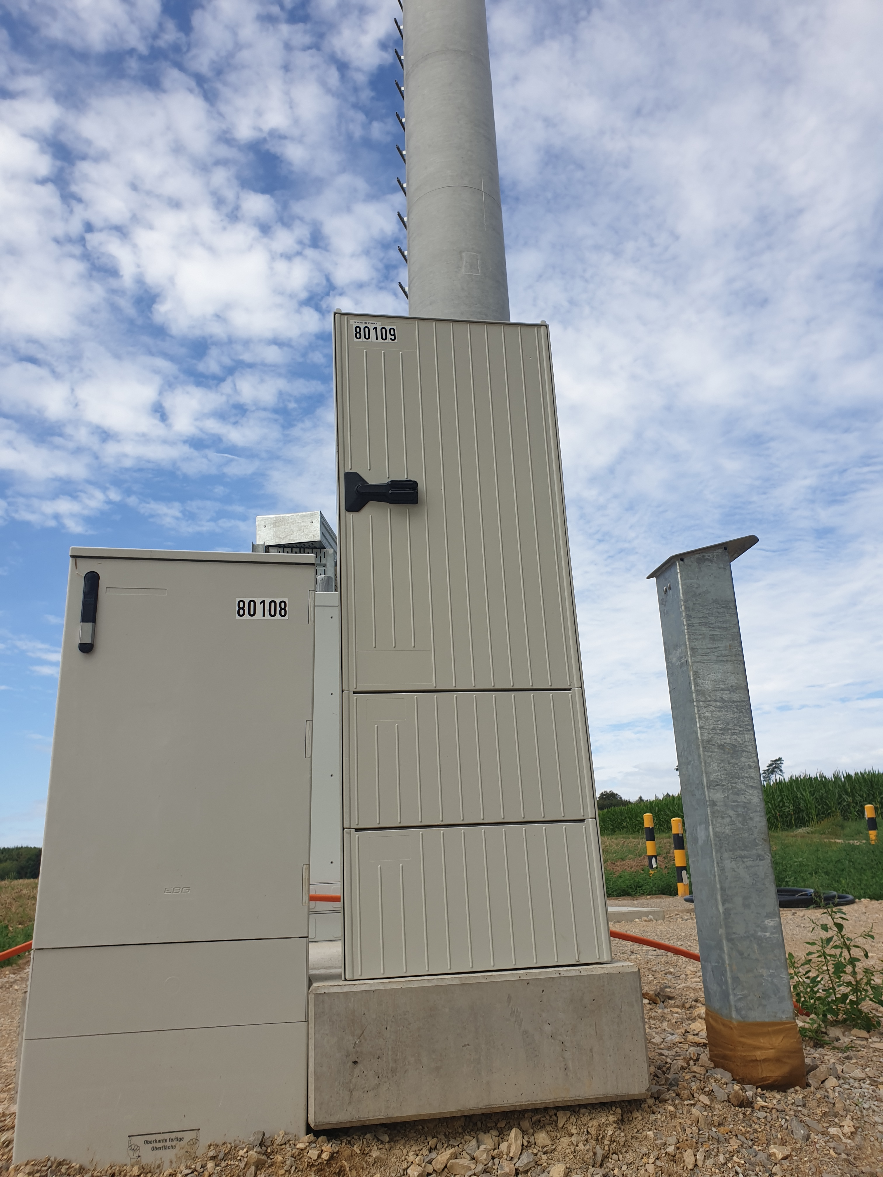 Zähleranschlusssäule an der Mobilfunksendeanlage (Standortnummer 183248) zwischen den Orten Schierling und Allersdorf.